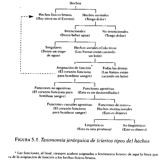 clasificacion de los hechos